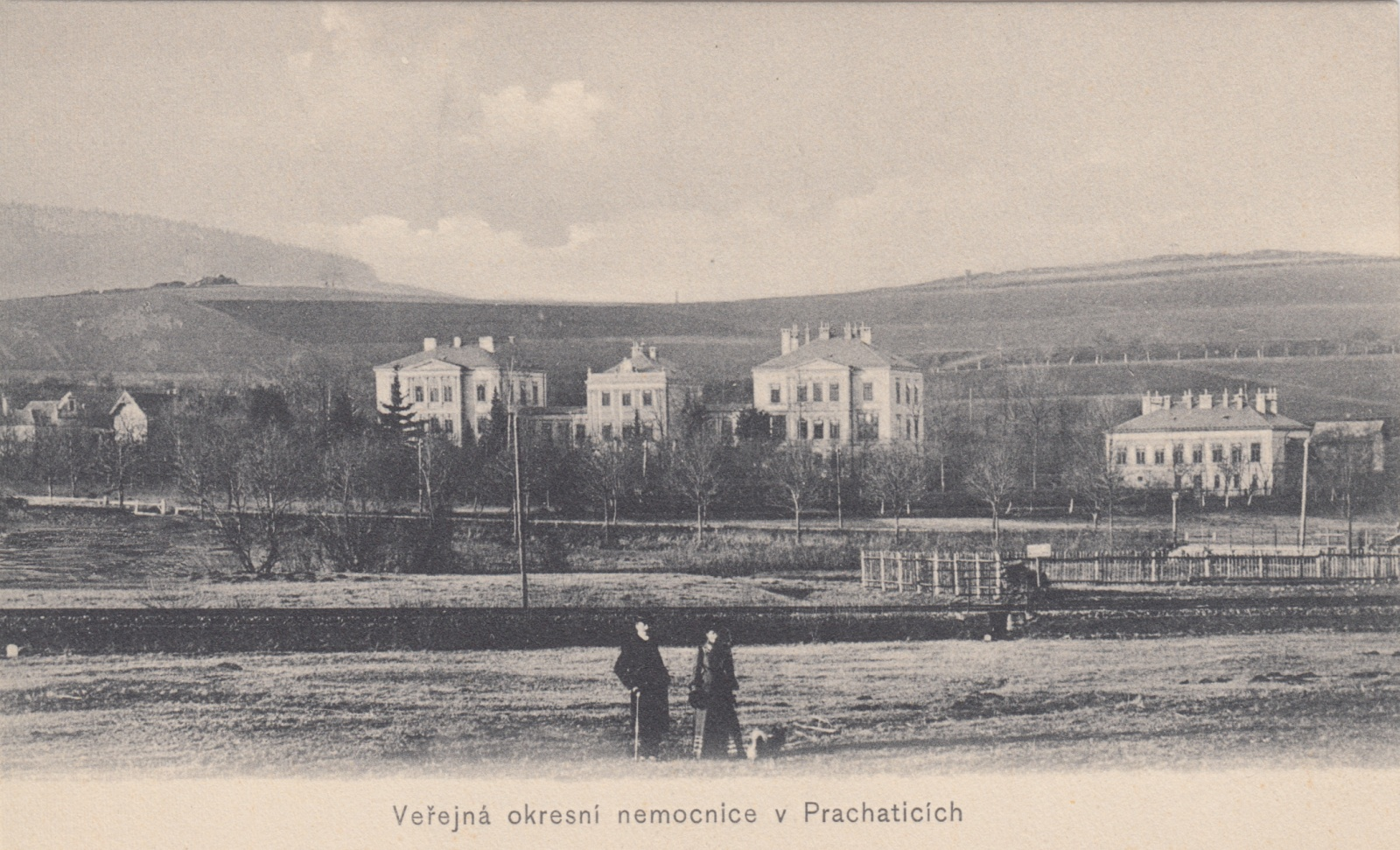 Veřejná okresní nemocnice v Prachaticích. Nákl. J. Zána v Prachaticích N. & Ch. P.